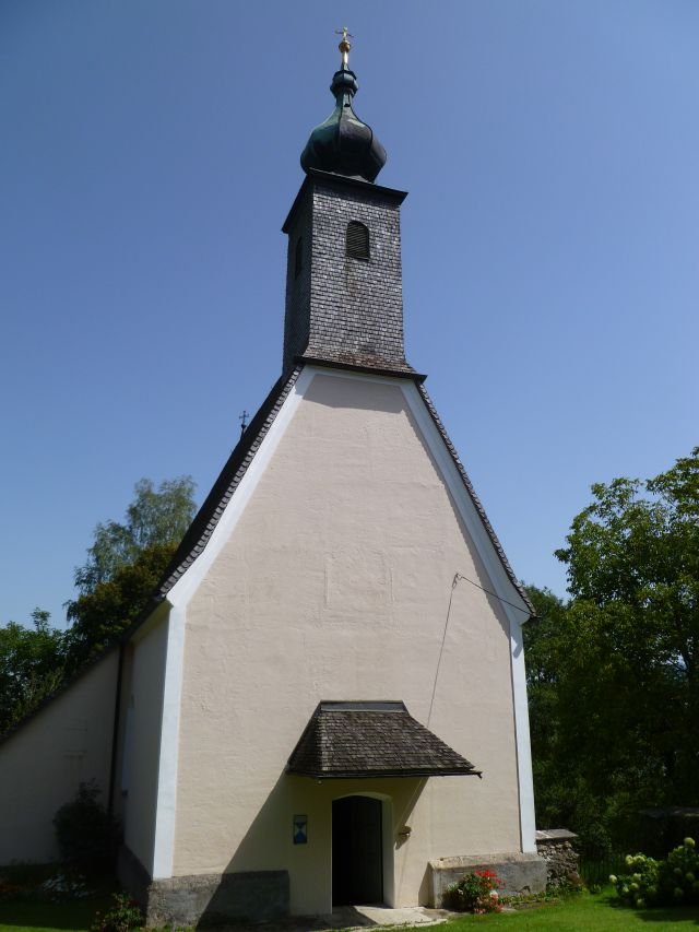 Filialkirche Maria Magdalena in Zell am Wallersee, Gemeinde Seekirchen